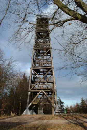 Der Küppelturm zeichnet sich durch seine robuste Holzbauweise und seine sich charakteristisch nach oben hin verjüngende Form aus.